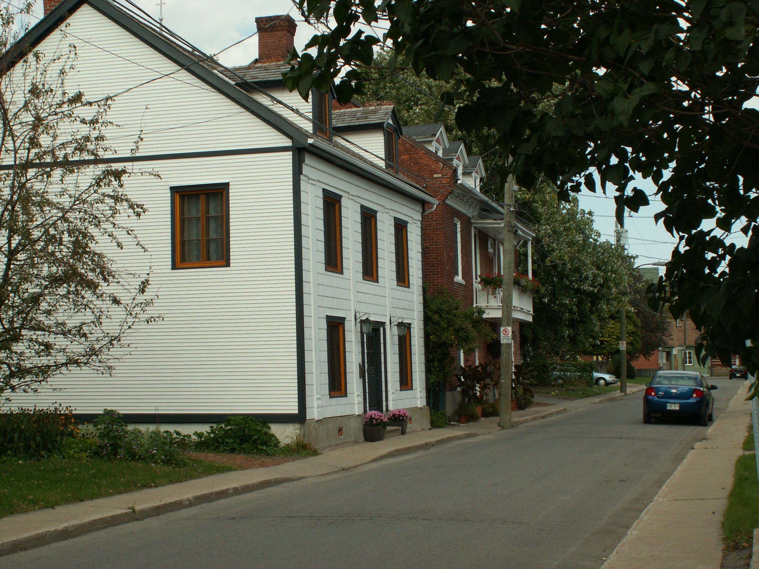 vieux La Prairie, Québec, Canada.